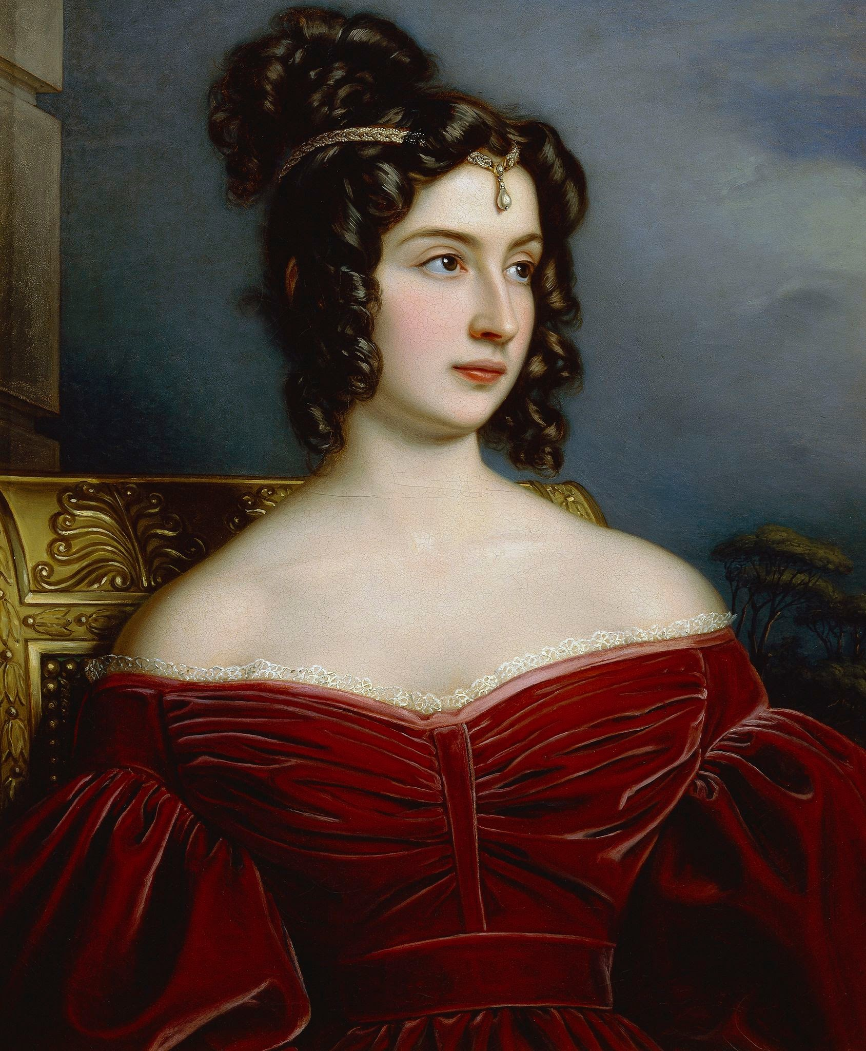 Marianna (1802-1870) was an Italian noble woman, translator, and lifetime friend of Ludwig I. von Bayern An Mariannina Siehe, Geliebte, das Meer, endlos da liegt´s vor den Blicken, endlos, wie solches, so ist unsere Anhänglichkeit auch.